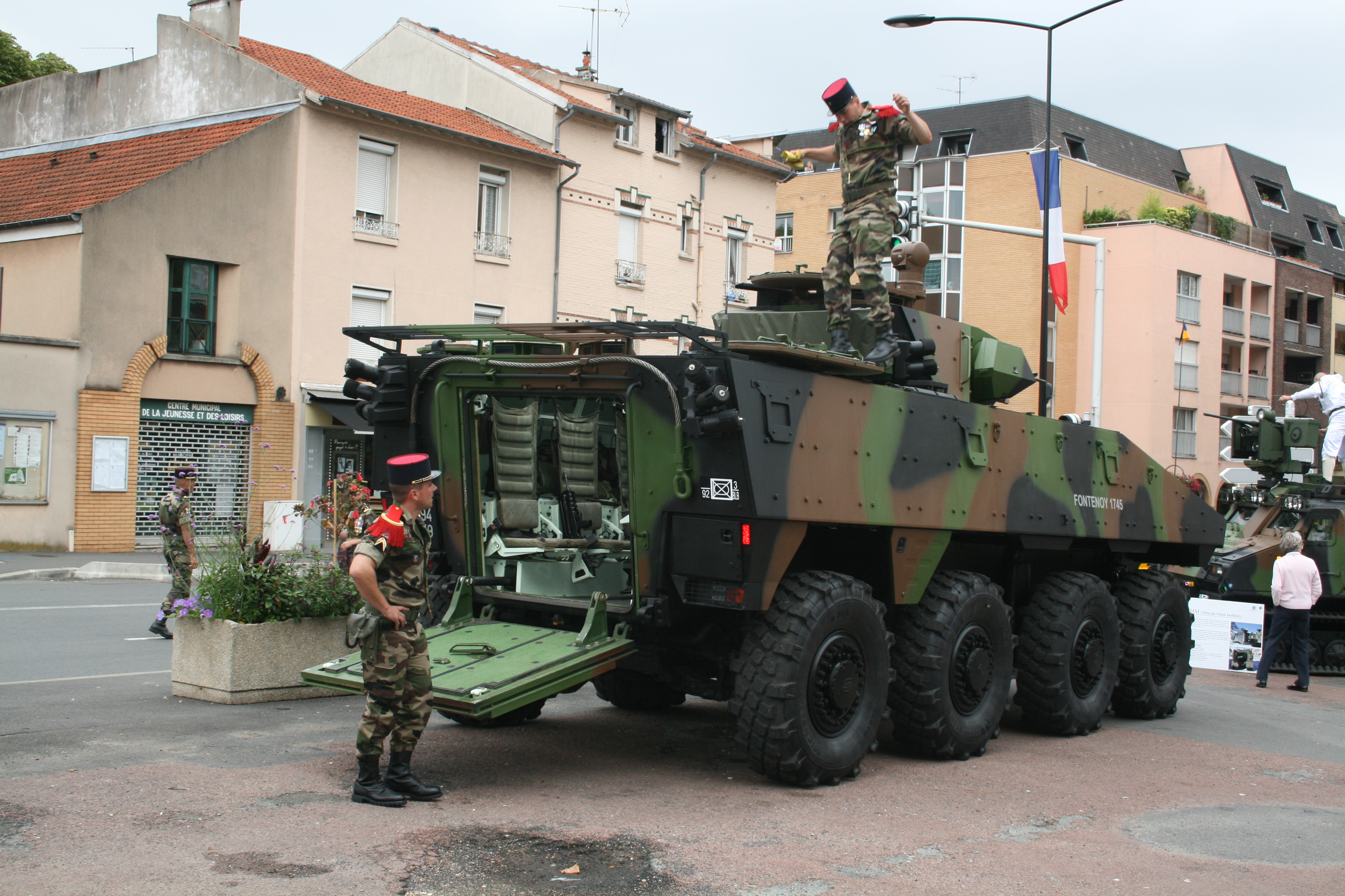 Photo prise lors d'un défilé devant la mairie de Cachan